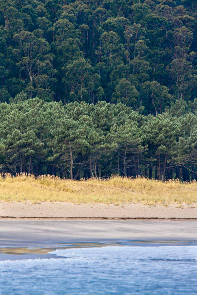 Vista parcial de la playa de Morouzos